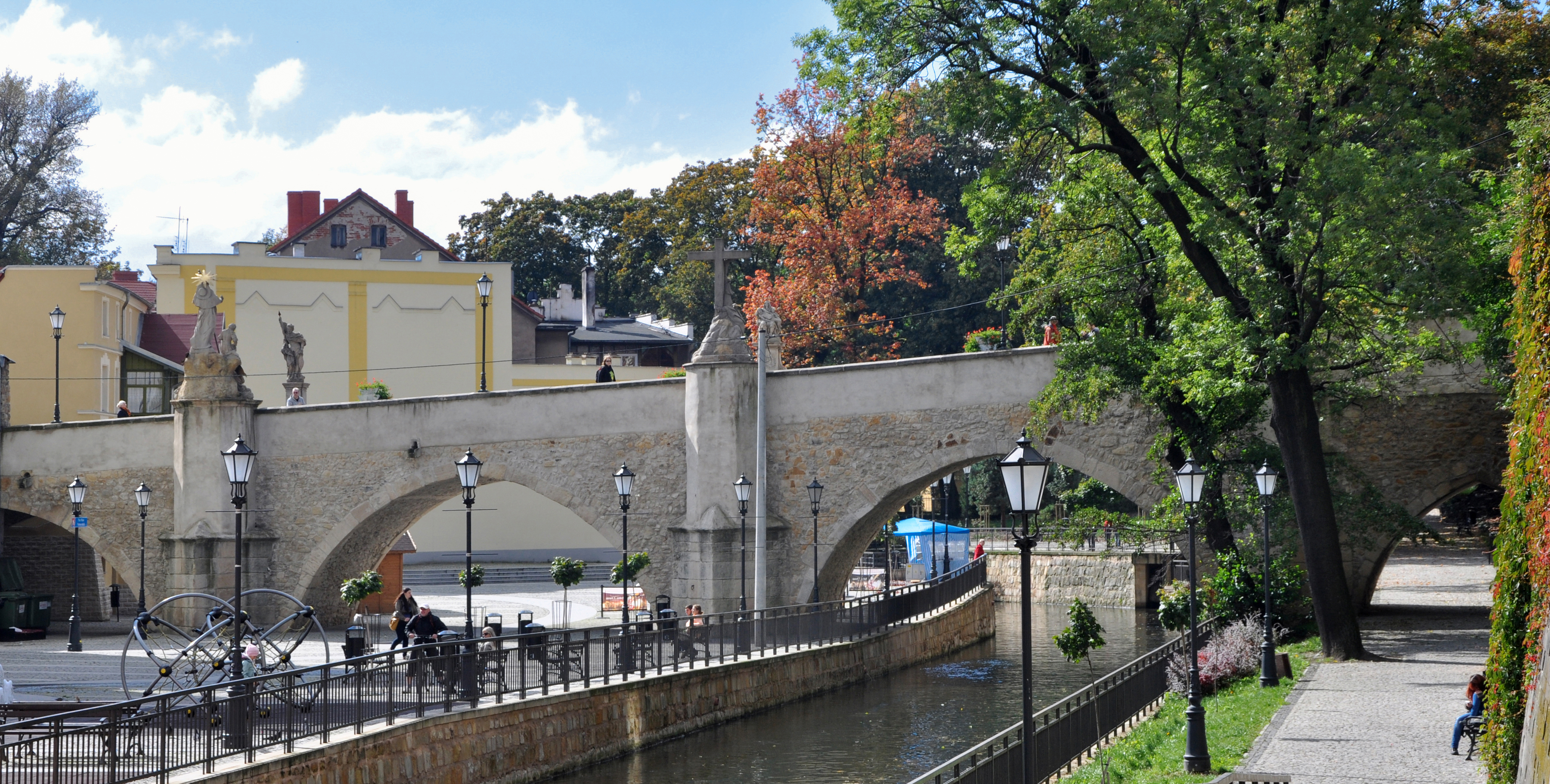 Kłodzko, most na młynówce, kon. XIV, 1628, 1701, 1750